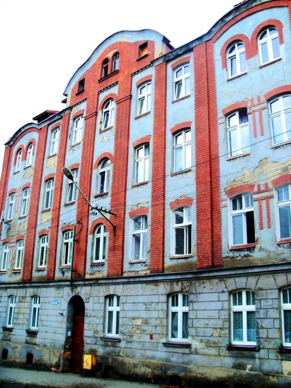 Kamienica przy ul. Słonecznej 3 w Katowicach